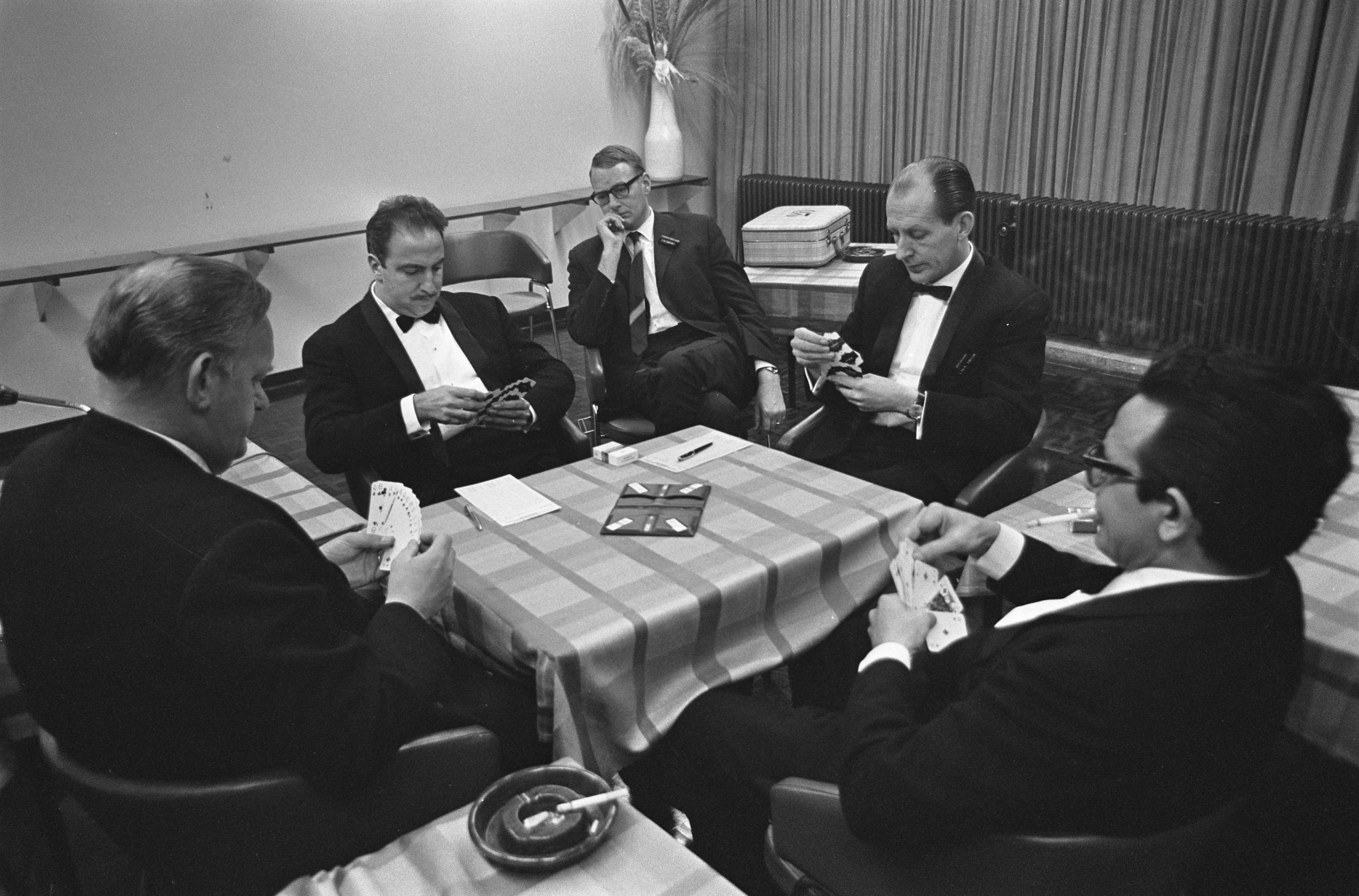 Collectie / Archief : Fotocollectie Anefo Reportage / Serie : [ onbekend ] Beschrijving : Bridge demonstratie van Omar Sharif in de RAI Datum : 9 december 1967 Locatie : Amsterdam Trefwoorden : bridge Persoonsnaam : Sharif, Omar Fotograaf : Kroon, Ron / Anefo, [onbekend] Auteursrechthebbende : Nationaal Archief Materiaalsoort : Negatief (zwart/wit) Nummer archiefinventaris : bekijk toegang 2.24.01.05 Bestanddeelnummer : 920-9140